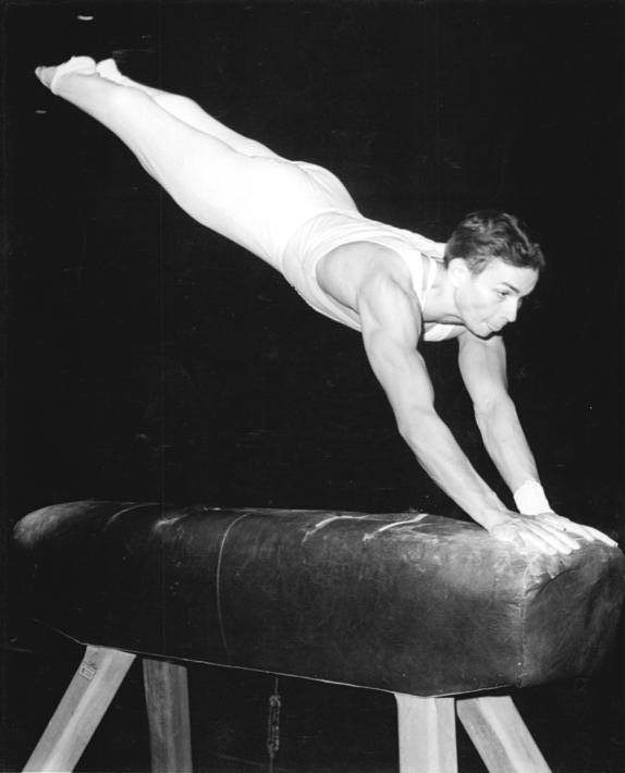 Zentralbild-Kohls Ko-Ki. 3.11.1963 7. Werner-Seelenbinder-Gedenkturnier. Interessanten Aufschluß über den derzeitigen Leistungsstand in der olympischen Pflicht für Tokio 1964 gab er sin der Meisterklasse der Männer und Frauen am 2.11.63 in der Berliner Dynamo Sporthalle, Karin Mannewitz und Klaus Köste führen nach der Pflicht. UBz.:Mit diesem Pferdsprung erkämpfte sich Klaus Köste (SC Leipzig) den ersten Platz in der Pflicht vor Erwin Koppe (SC DHfK)